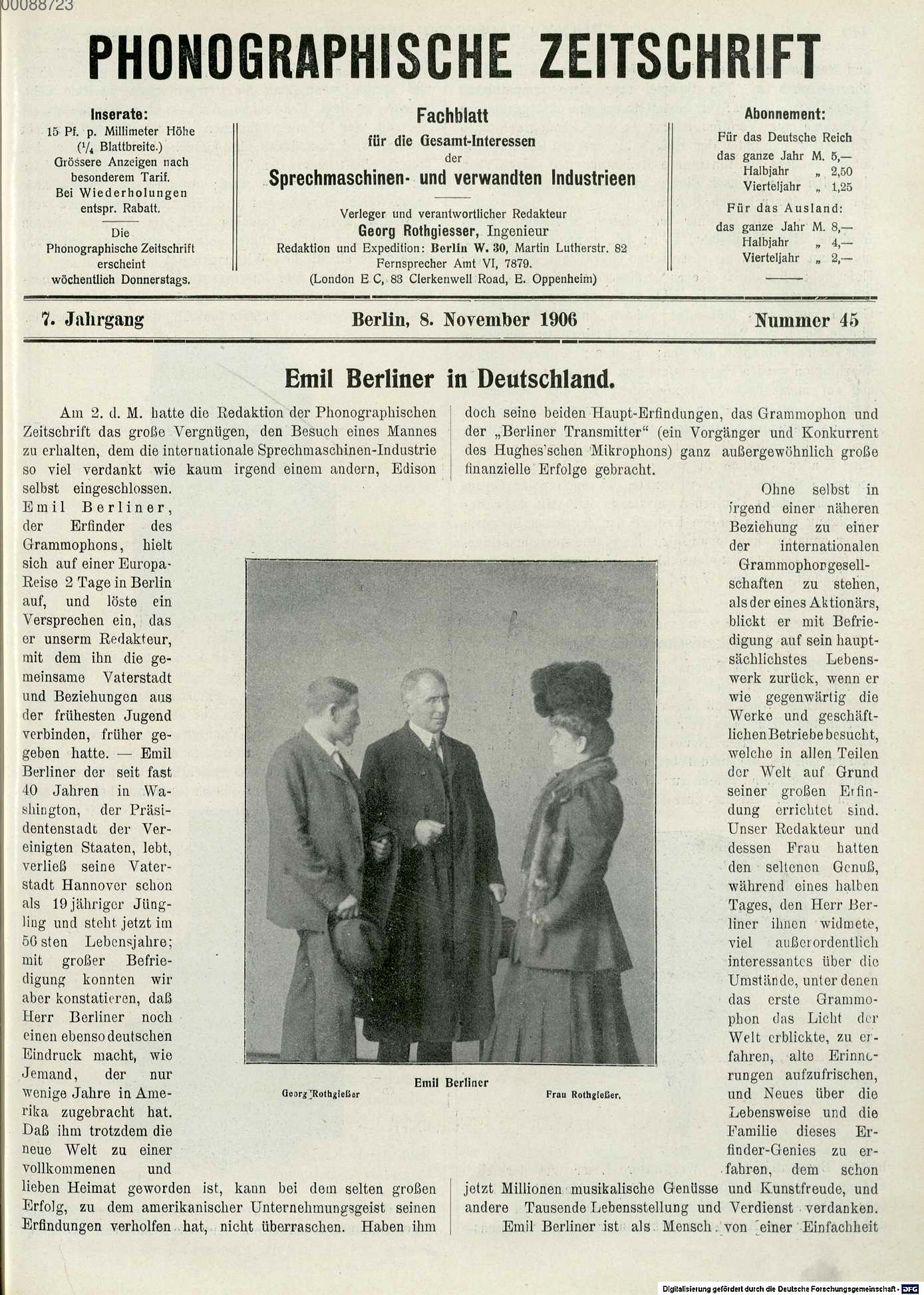 Titelblatt der Phonographischen Zeitschrift vom 8. November 1906 mit dem Aufmacher „Emil Berliner in Deutschland.“ Das Foto in der Seitenmitte zeigt, (von links) den Verleger und verantwortlichen Redakteur des Fachblattes, Georg Rothgießer, den (Schallplatten-)Erfinder Emil Berliner sowie "Frau Rothgießer" ...